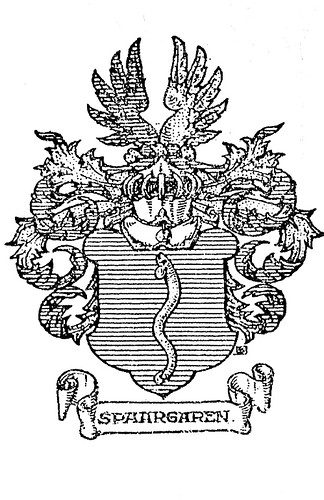 De familie Spaargaren voert een familiewapen waarvan de beschrijving luidt: “In blauw een kronkelende aal, paalsgewijs, kop omhoog, van goud. Helmteken: een blauw-gouden vlucht. Dekkleden: goud en blauw” Het wapen verwijst naar het wapen van Aalsmeer en het beroep van de eerste Spaargarens: palingvisser. Het familiewapen is in het blad “Gens Nostra” van de Nederlandse Genealogische Vereniging gepubliceerd.